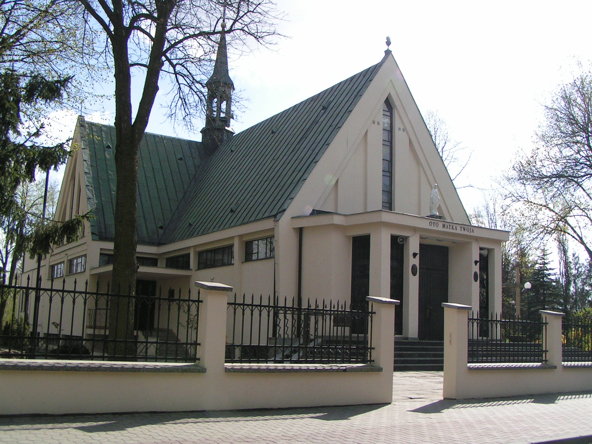 Kościół św. Jana Apostoła Ewangelisty znajdujący się w warszawskich Gołąbkach